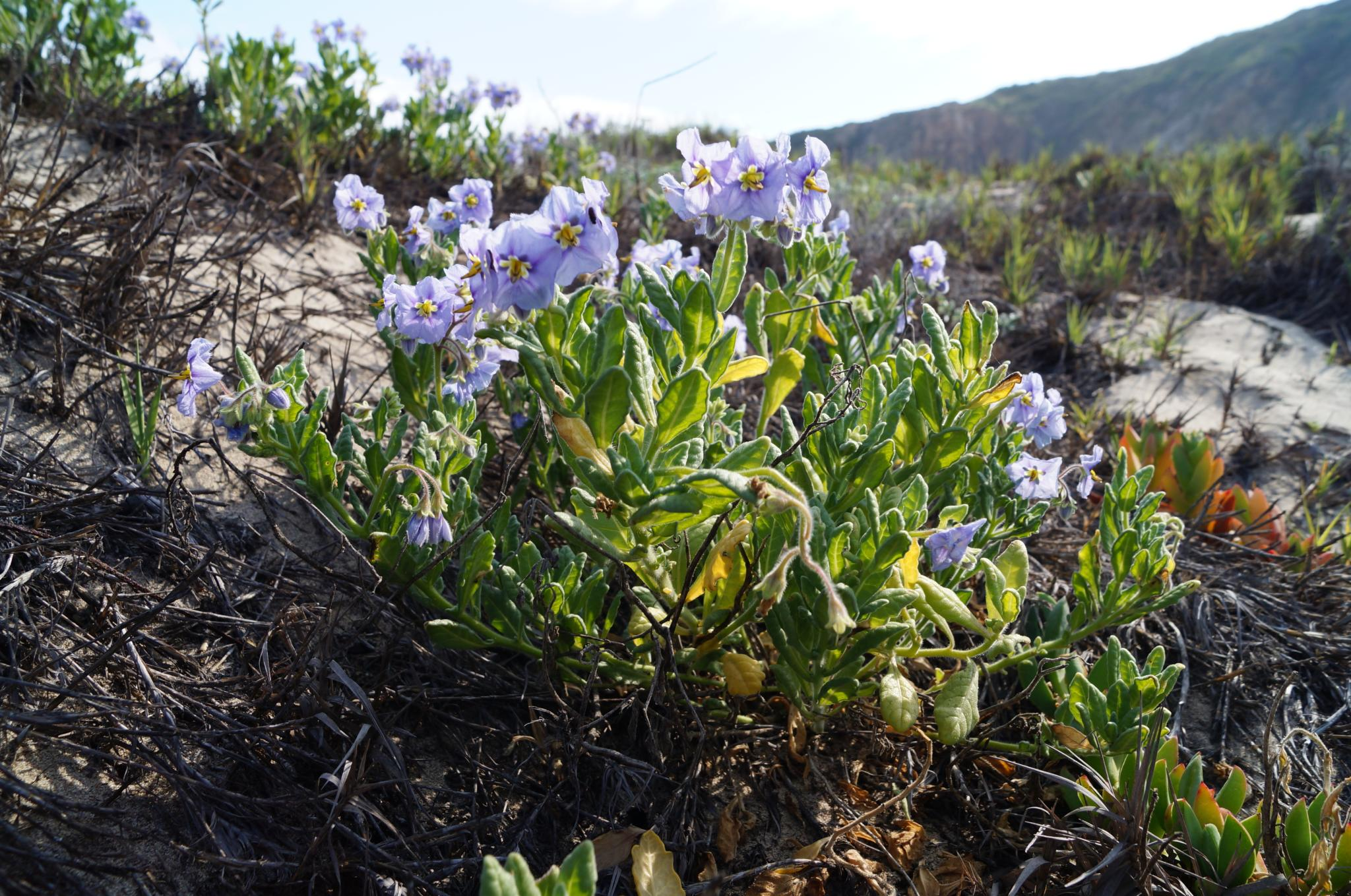 Solanum coquimbense. Especie endémica de Playa Agua Amarilla, Los Vilos